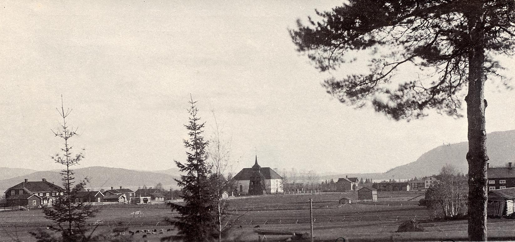 Undersvik, Hälsingland, Sweden around 1900